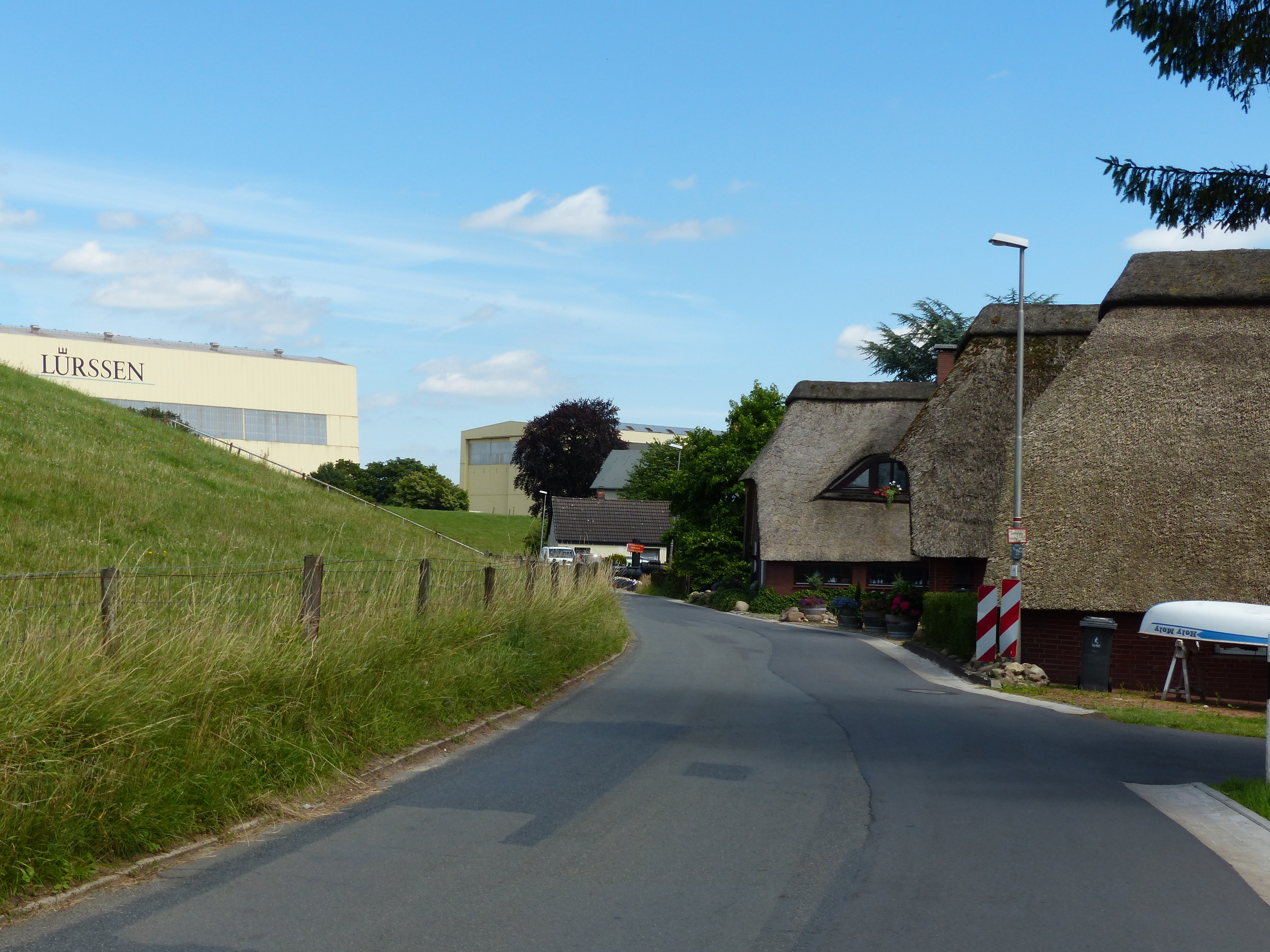 Schifferhäuser mit Reetdach am Deich in Lemwerder, im Hintergrund eine Halle der Lürssen-Werft